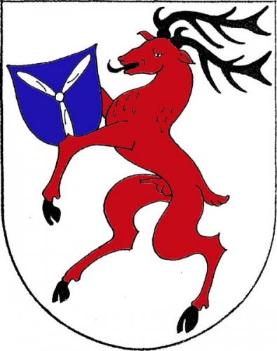 znak, Sedlec, okres Třebíč